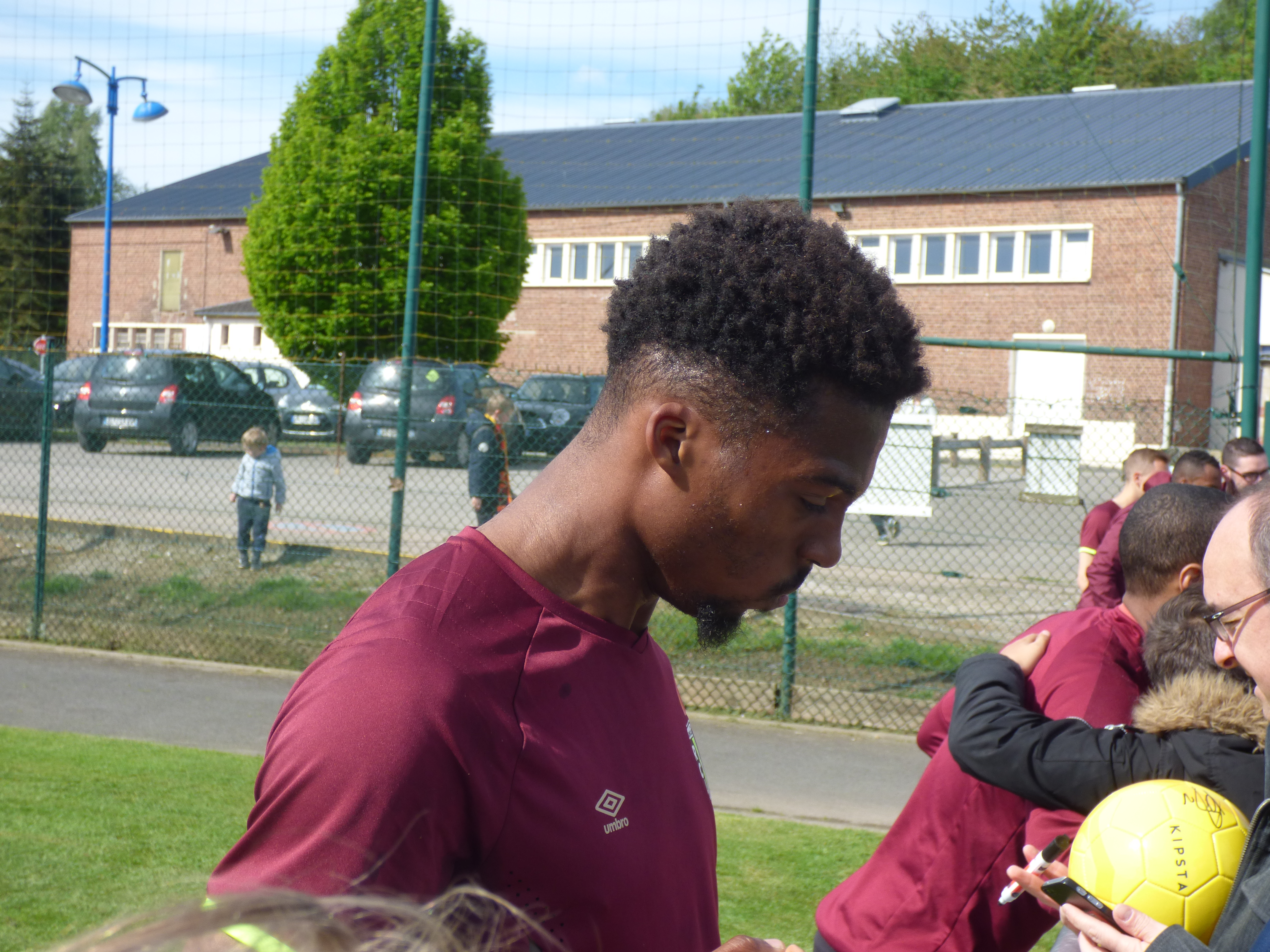 Jean-Kévin Duverne lors d'un entraînement public du Racing Club de Lens au Centre technique et sportif La Gaillette, le 2 mai 2018.